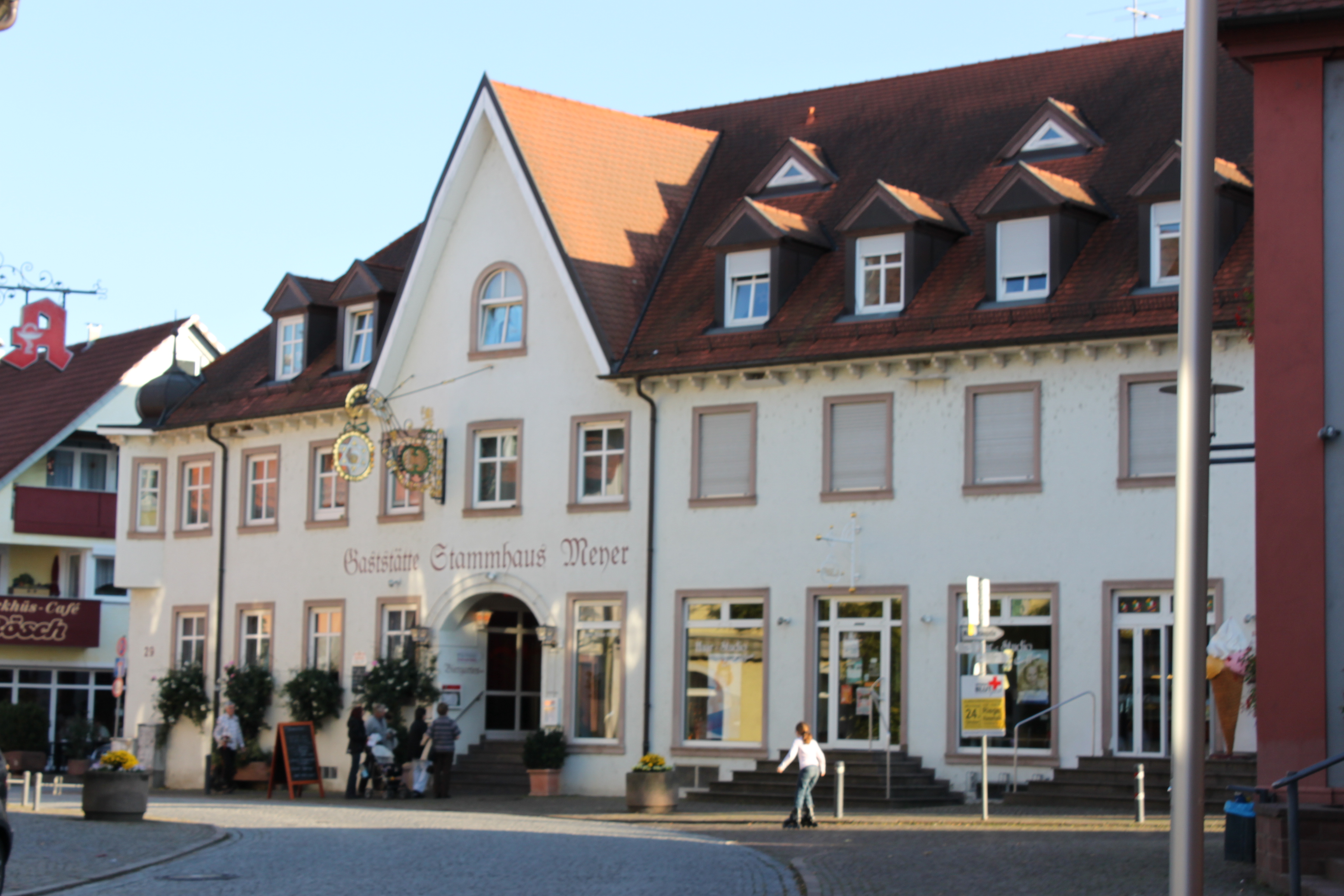 Riegel am Kaiserstuhl: Gasthaus Stammhaus; heutiger Zustand; Wiederaufbau nach Brand